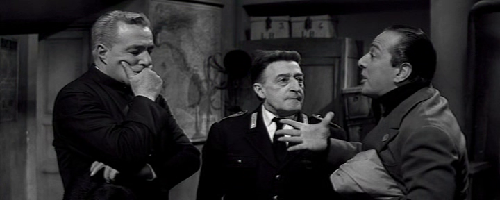 Screenshot del film I due marescialli (1961) diretto da Sergio Corbucci